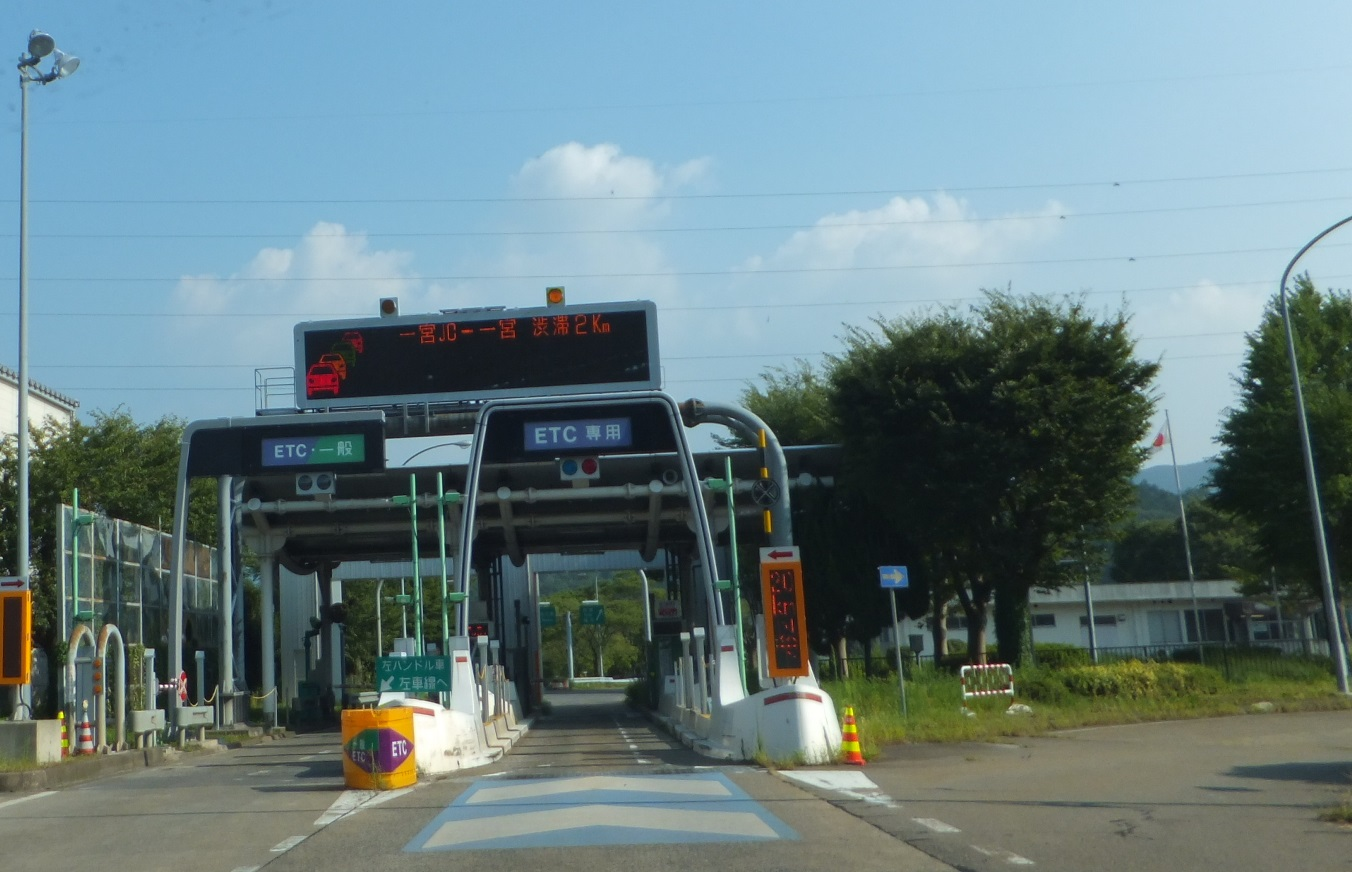 関ケ原インターチェンジ